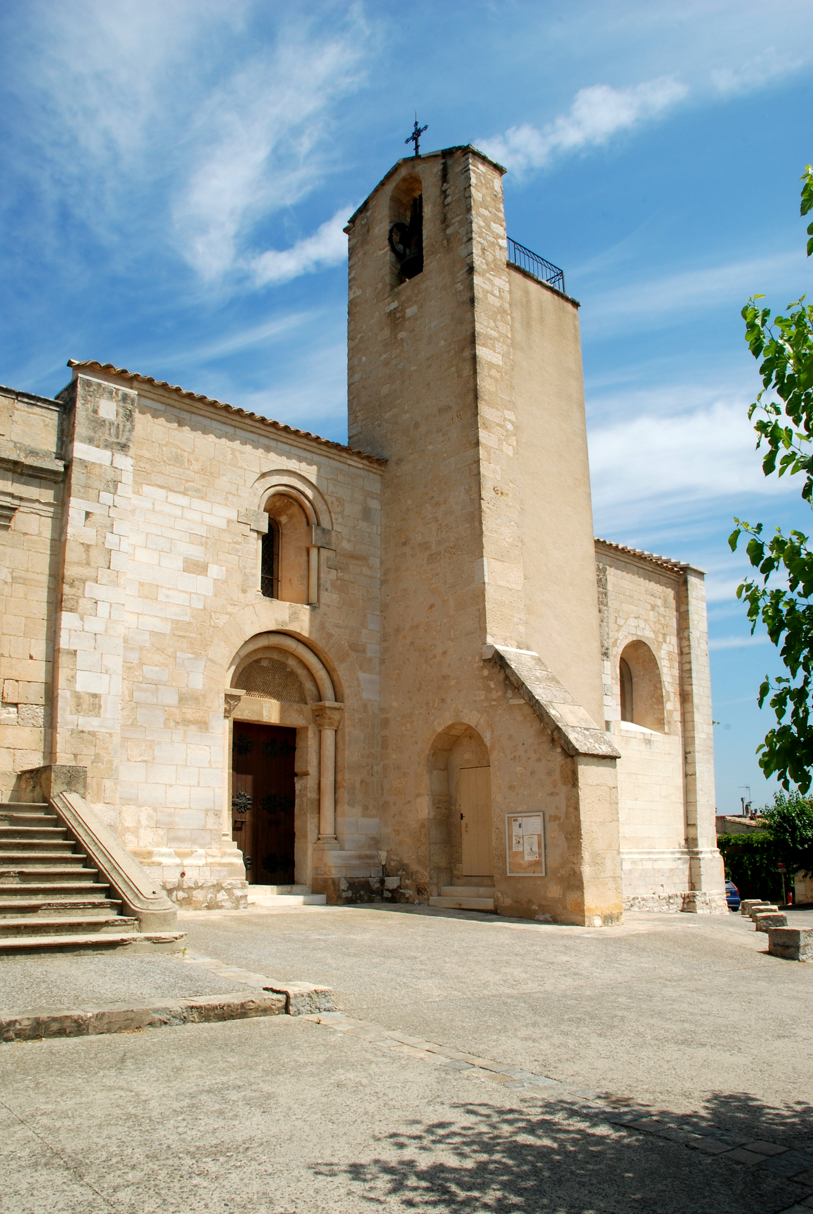 France - Languedoc - Hérault - Église Saint-Martial d'Assas